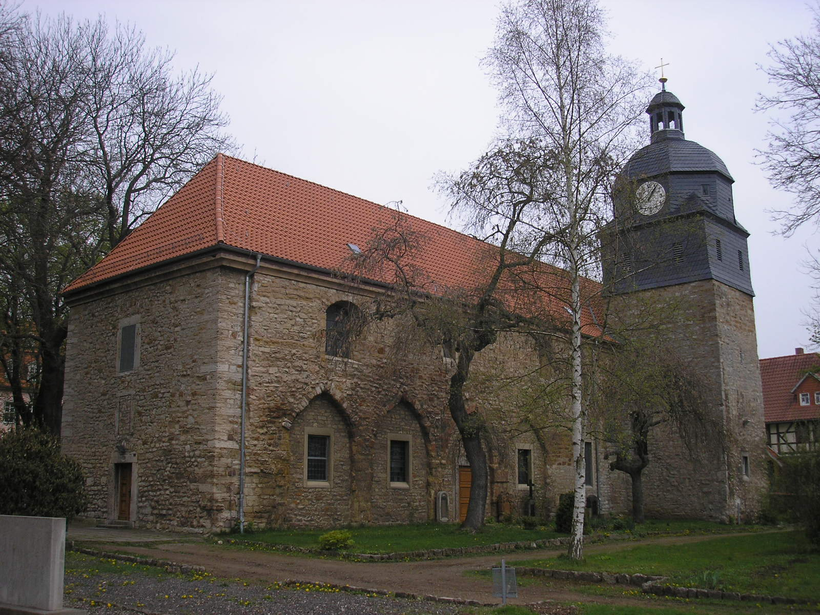 Die Stadtkirche von Schlotheim (Thüringen).